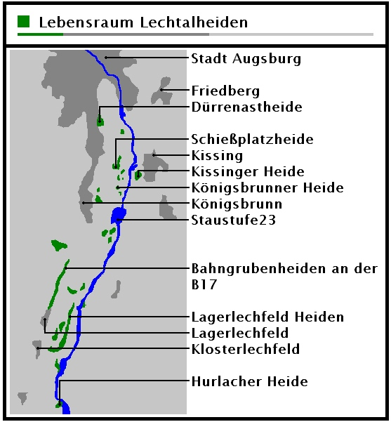 Verbreitungsschema